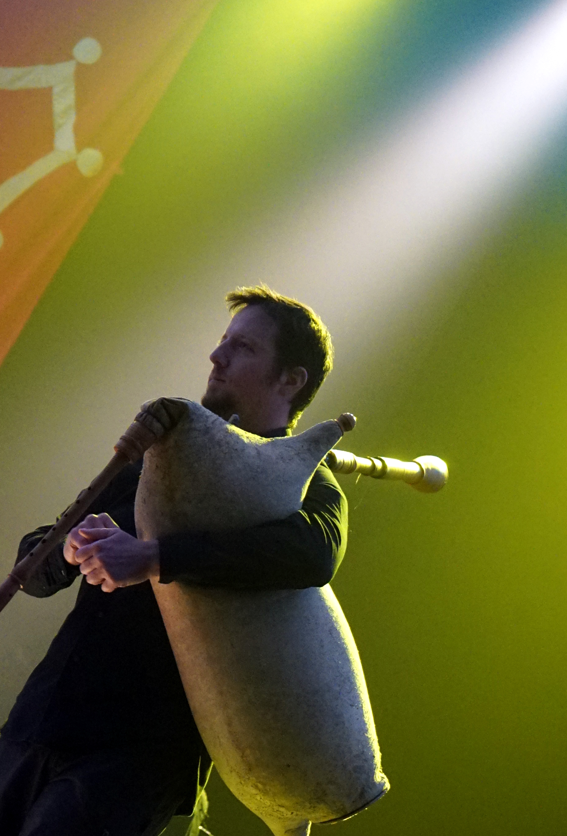 en concert lors du Centenaire de la bataille du Chemin des Dames.